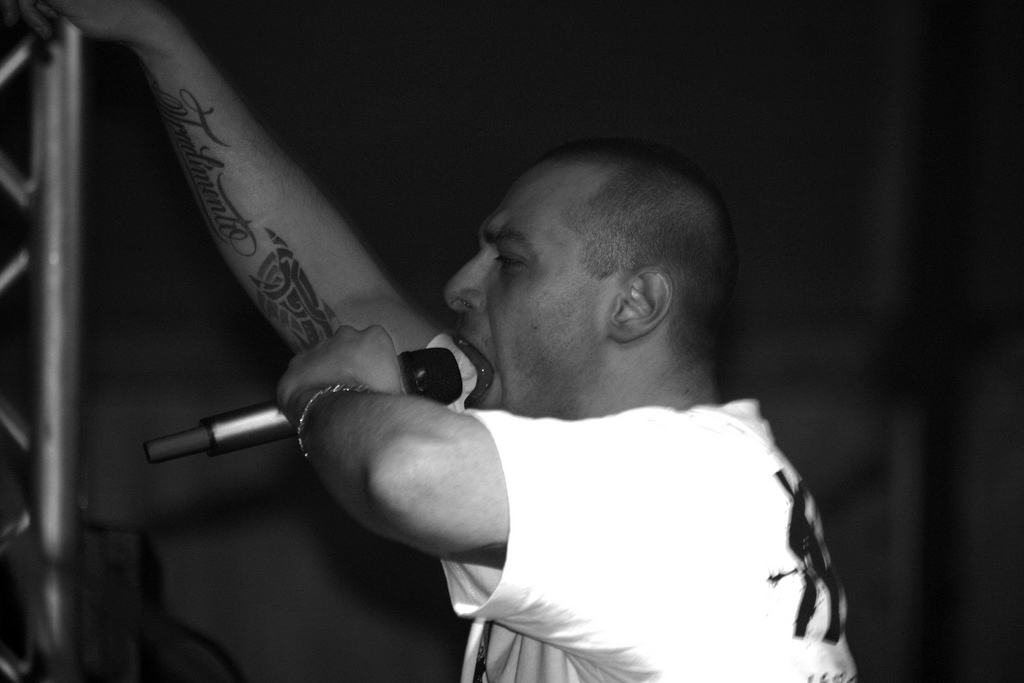 @Mtv Pulse - Udine